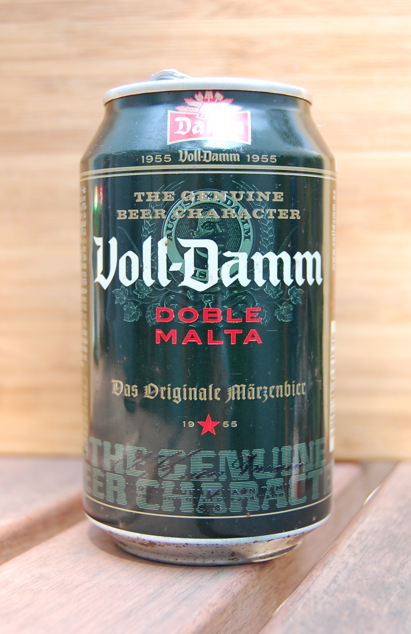 Una lata de cerveza Voll Damm.